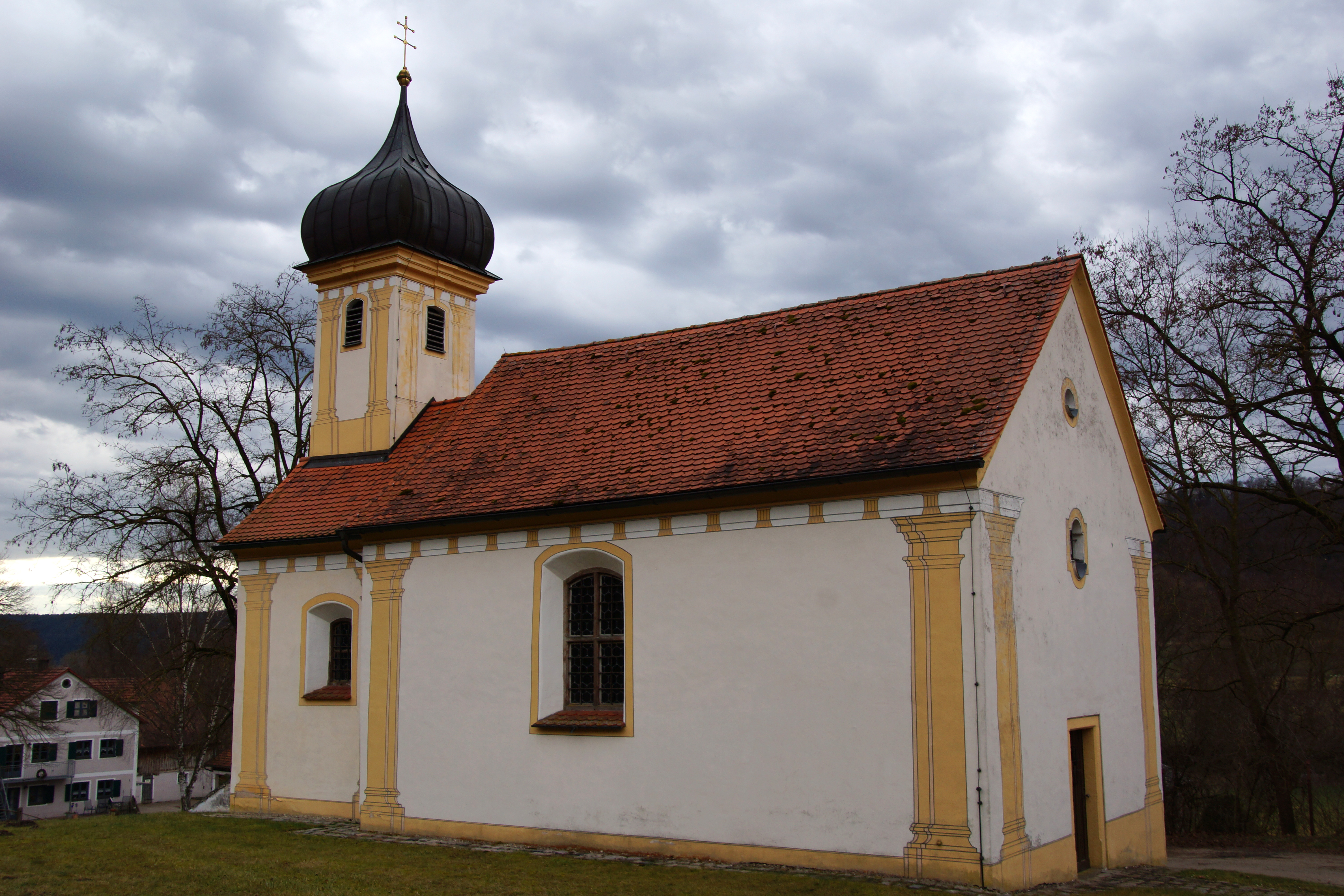 Die katholische Filialkirche St. Michael in Leising an der Altmühl